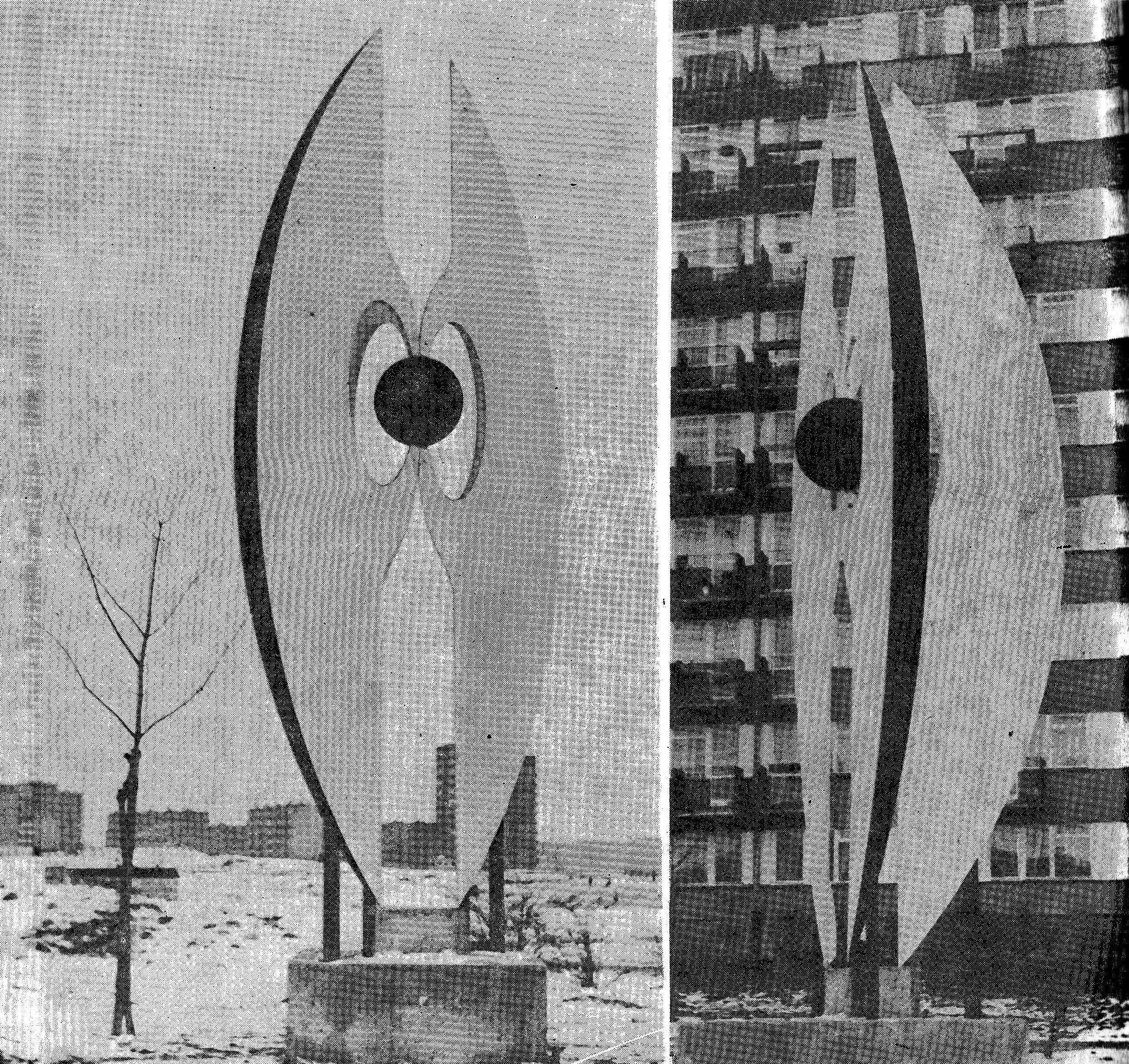 Jan Ziemski, forma przestrzenna, 1970/1978. Miejsce prezentacji projektu: Sympozjum Plastyczne Wrocław '70, Wrocław, 1970. Realizacja: Lubelskie Spotkania Plastyczne, ul. Juranda 1, os. Sienkiewiczowskie, Lublin, 1978. Fotografia: najprawdopodobniej Jan Bortkiewicz lub Michał Diament lub Zdzisław Holuka lub Czesław Żuk. Źródło: "Sympozjum Plastyczne Wrocław '70", red. Danuta Dziedzic, Zbigniew Makarewicz, Zjednoczone Przedsiębiorstwa Rozrywkowe Ośrodek Teatru Otwartego "Kalambur", Wrocław 1983, s. 147-148; por. "Lubelskie Spotkania Plastyczne", red. Maryla Kowalska, Krajowa Agencja Wydawnicza, 1979, s. 18.